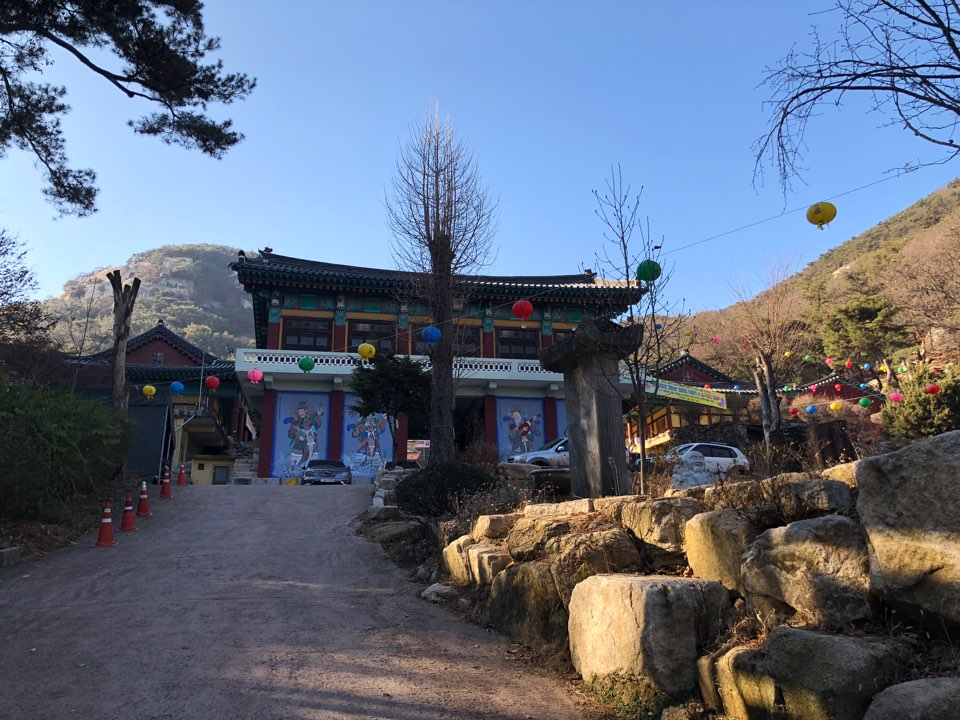 불암사 사진